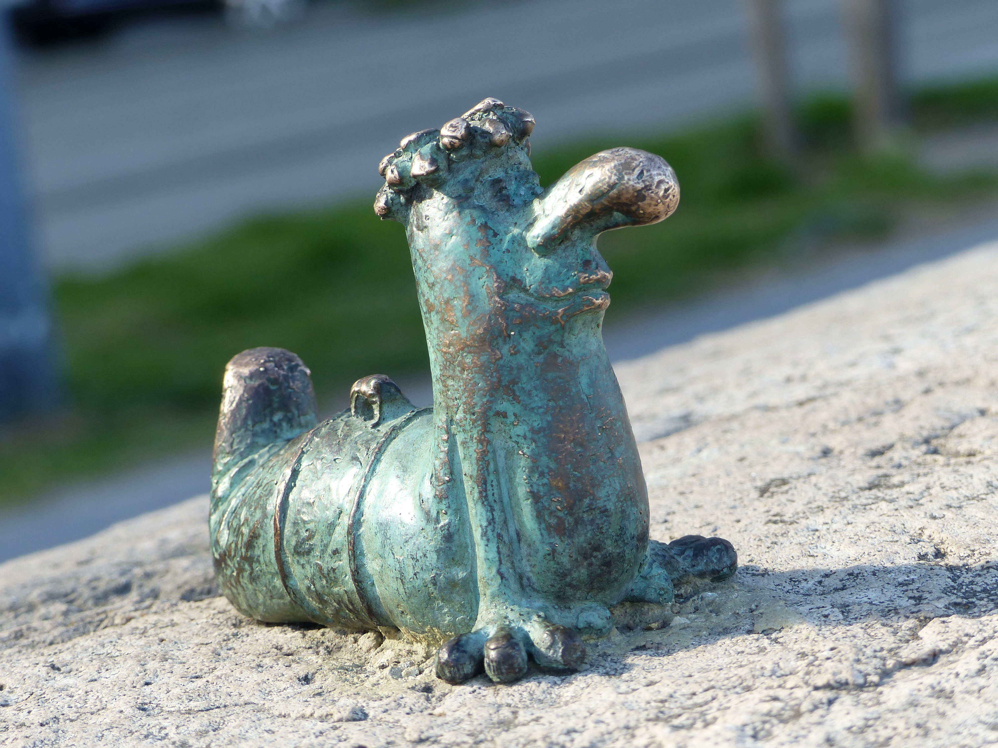 Főkukac. A felvétel 2017. március 27-én hétfőn készült a Bem rakparton, a Halász utcai lejárónál. Sajdik Ferenc rajzfilmfigurája a nagy ho-ho horgász című rajfilmből. A 15 cm-es bronz szobrot Mihajlo Kolodko ukrán szobrász készítette. 2016 november 29-én késő este helyezték el a kis szobrot korábban az Ung partján, Ungváron, a Filharmónia közelében.